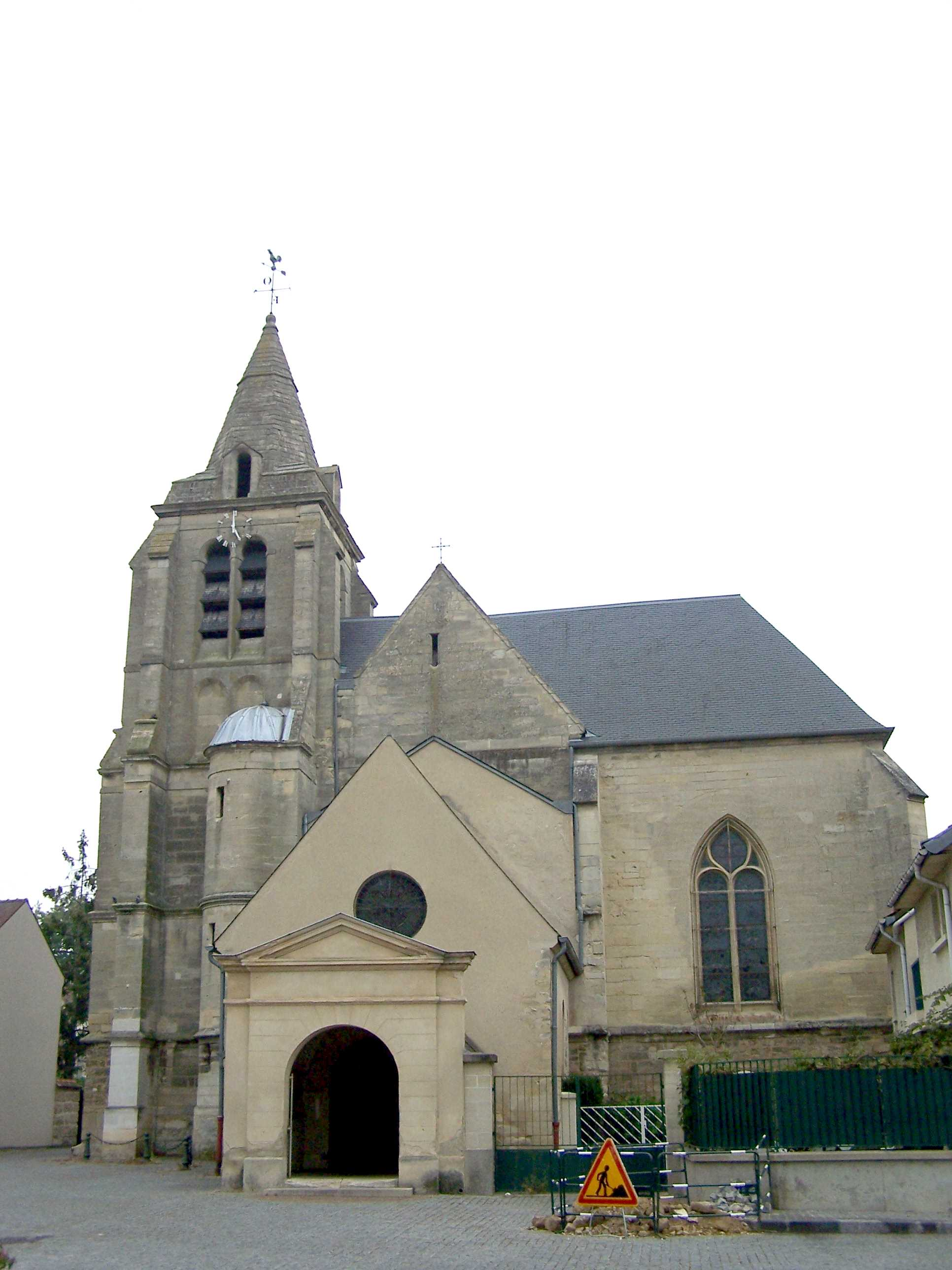 Église du Mesnil-le-Roi (Yvelines, France)